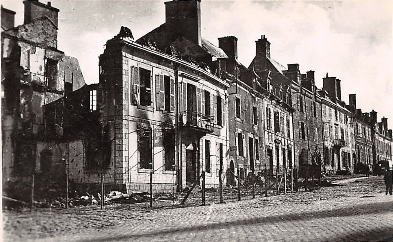 Maisons en ruine place du Marché à Hennebont suite aux bombardements du 7 août 1944.